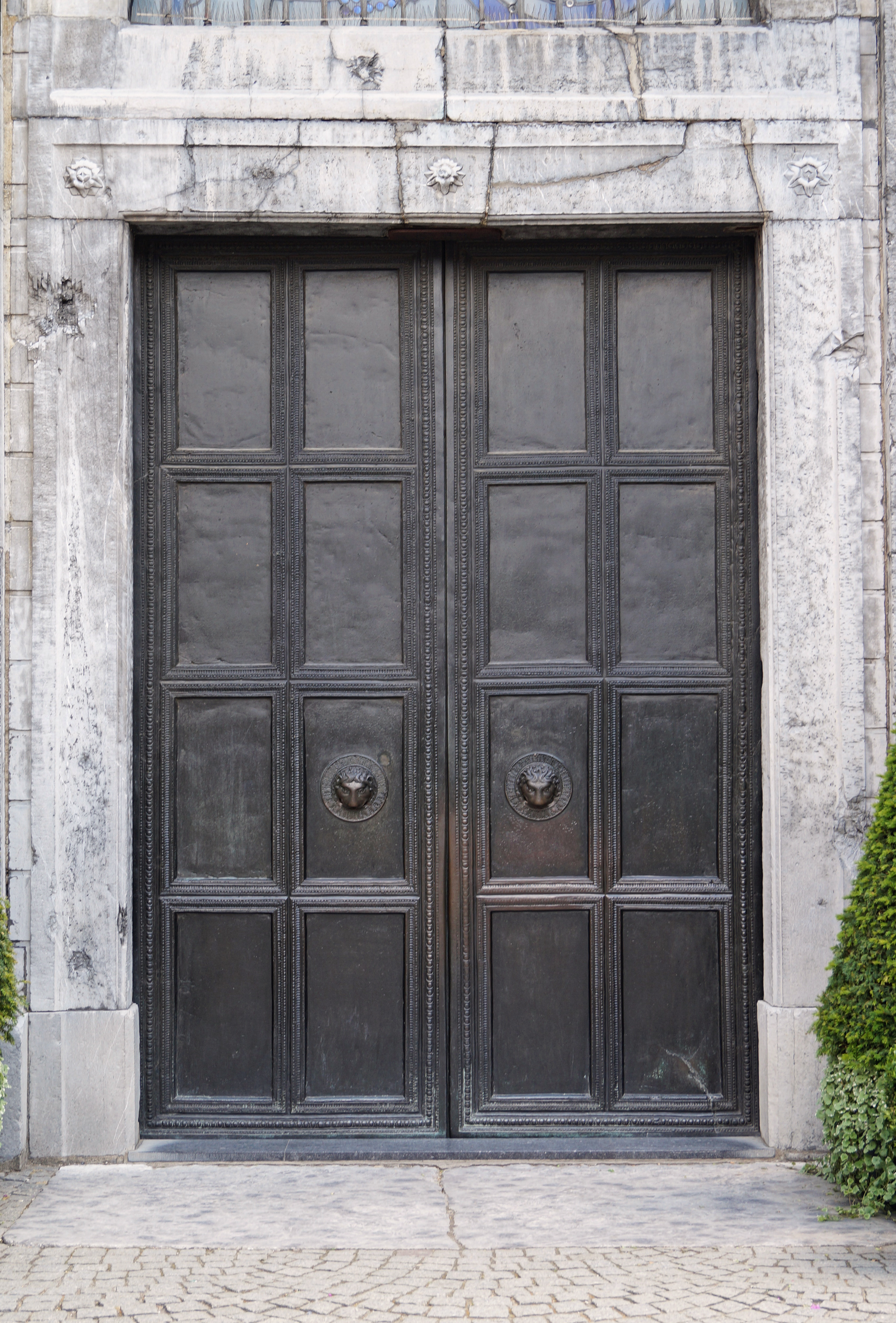 Aachener Dom Portal Bronzetore